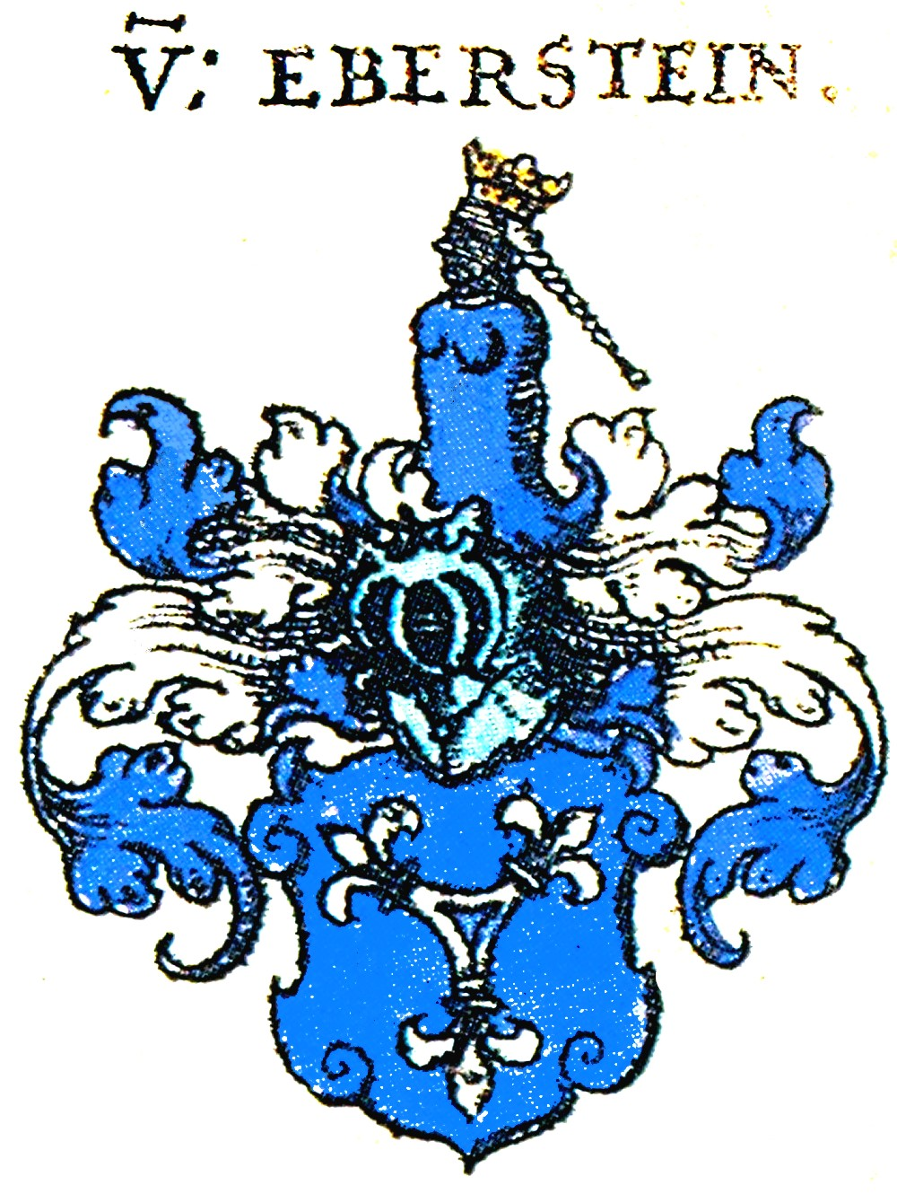 Ritterschaft und Adel in Franken von Eberstein